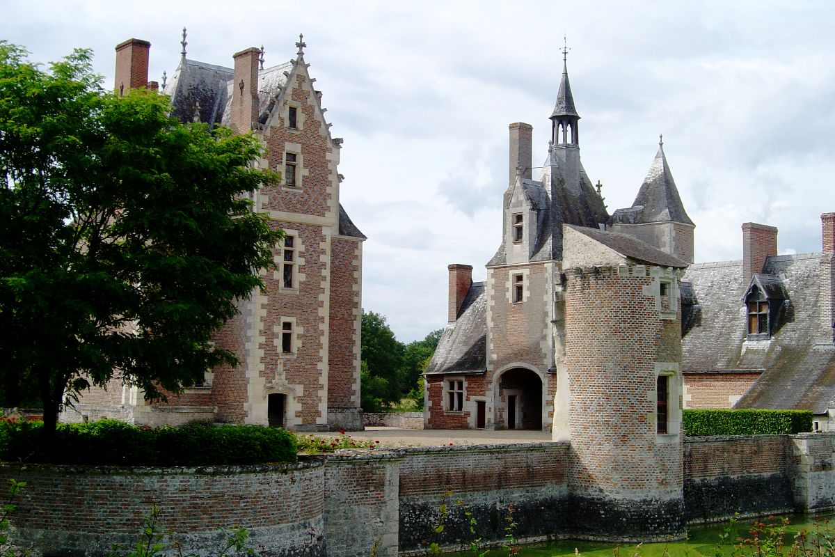 Château du moulin